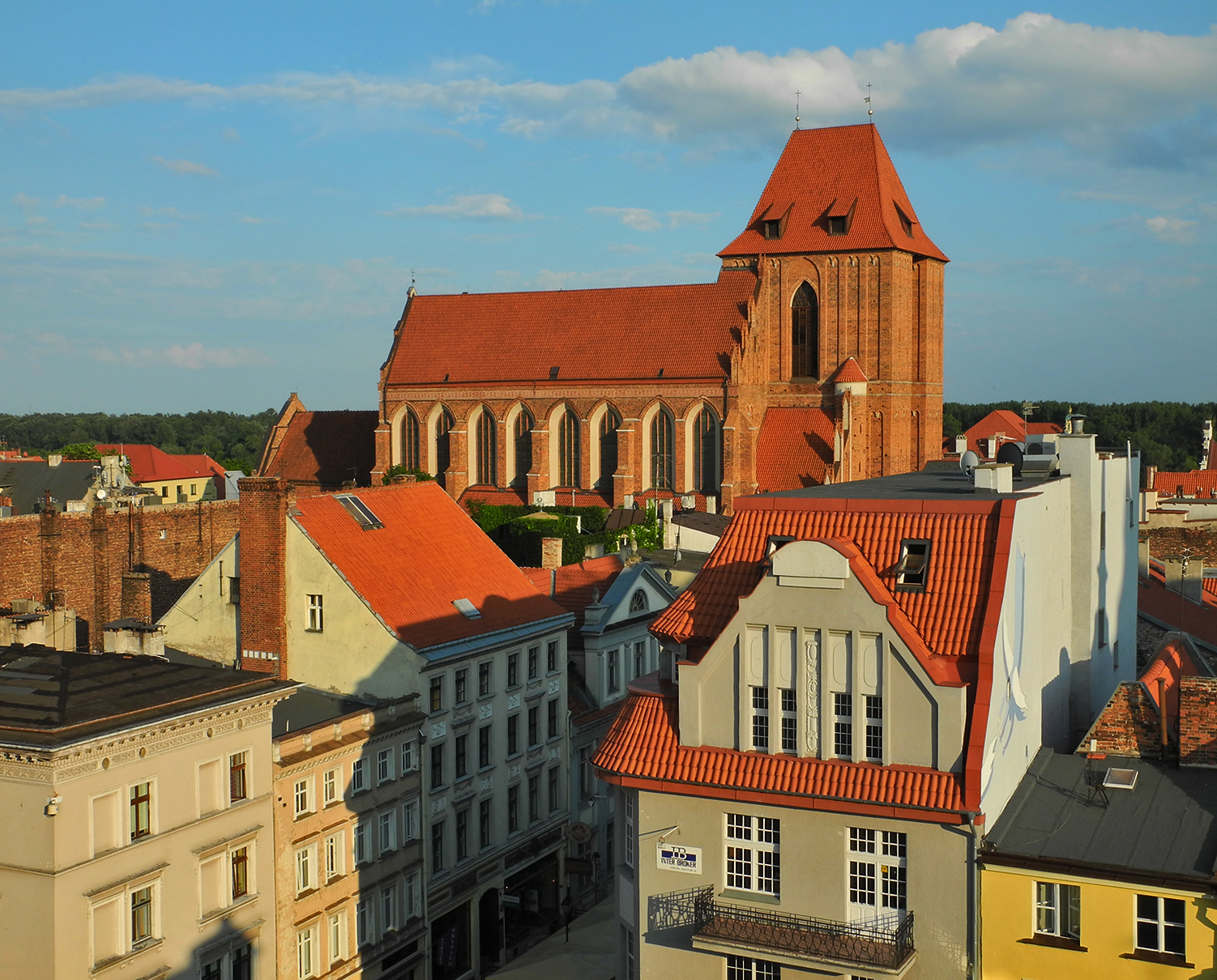 Toruń dzielnica staromiejska - w tle kościół parafialny, obecnie katedra p.w. św. Jana Chrzciciela i Jana Ewangelisty (zabytek nr A/275/244)